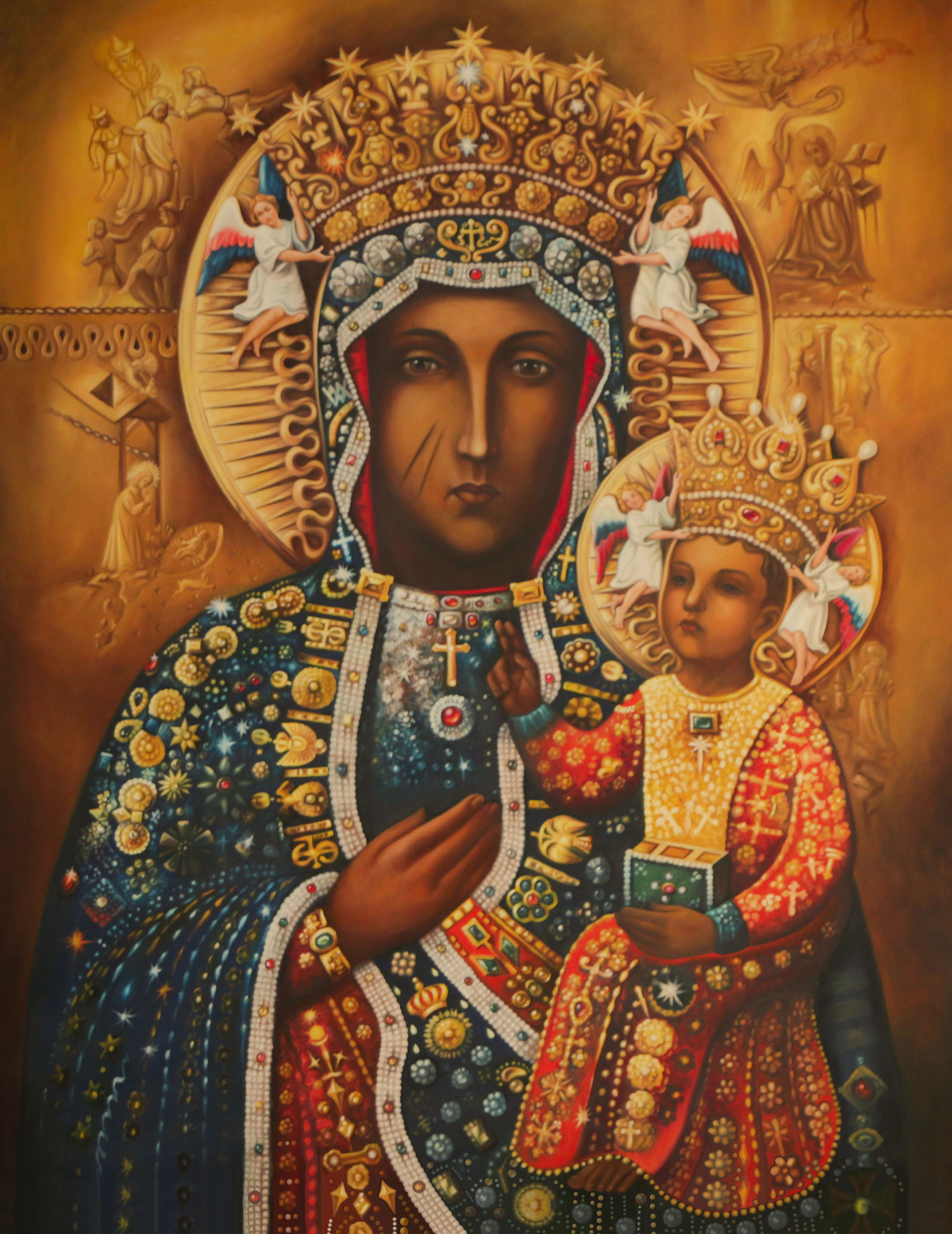 Derivative of Black Madonna of Częstochowa